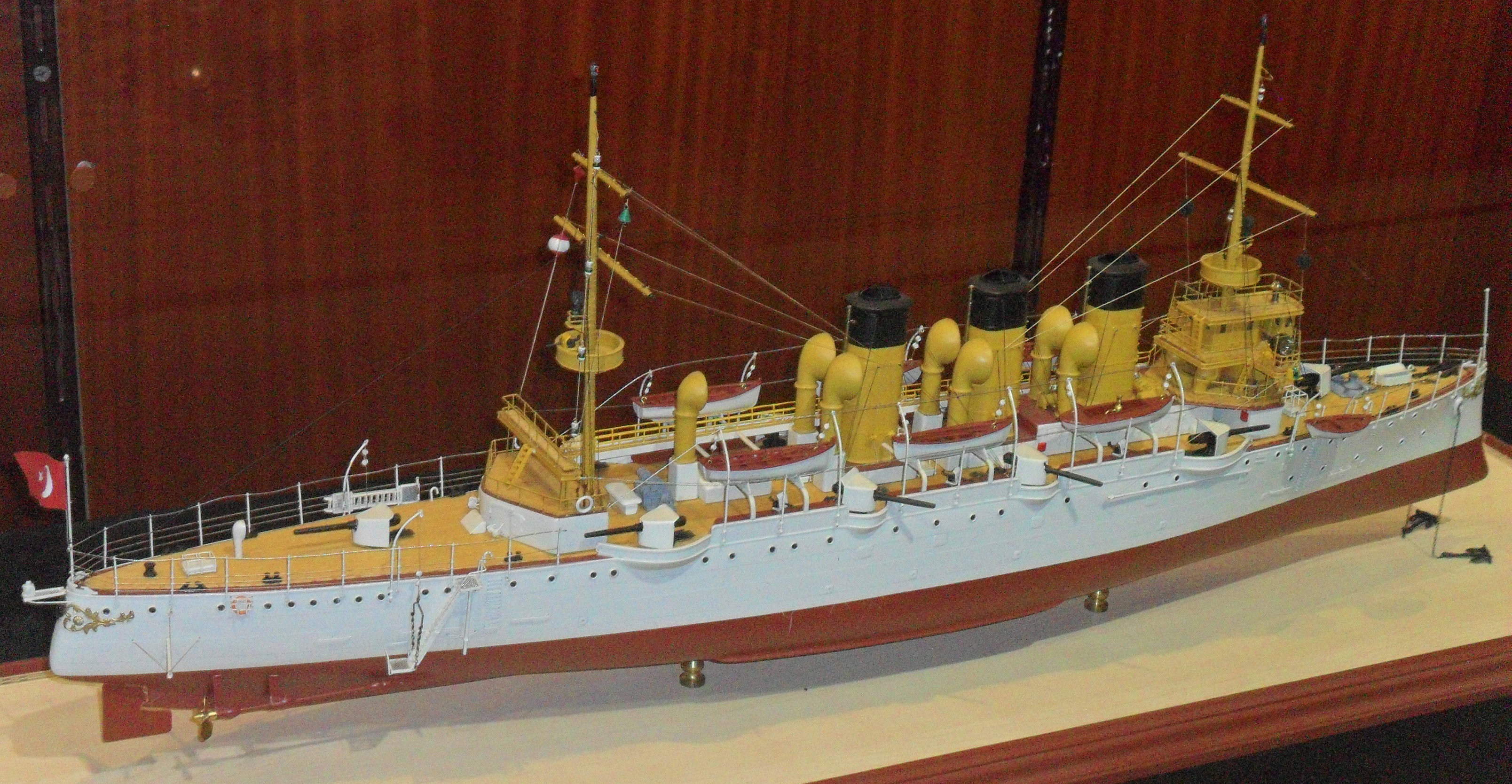 Mersin Deniz Müzesinde sergilenmekte olan Mecidiye kruvazörü tam gemi modeli.